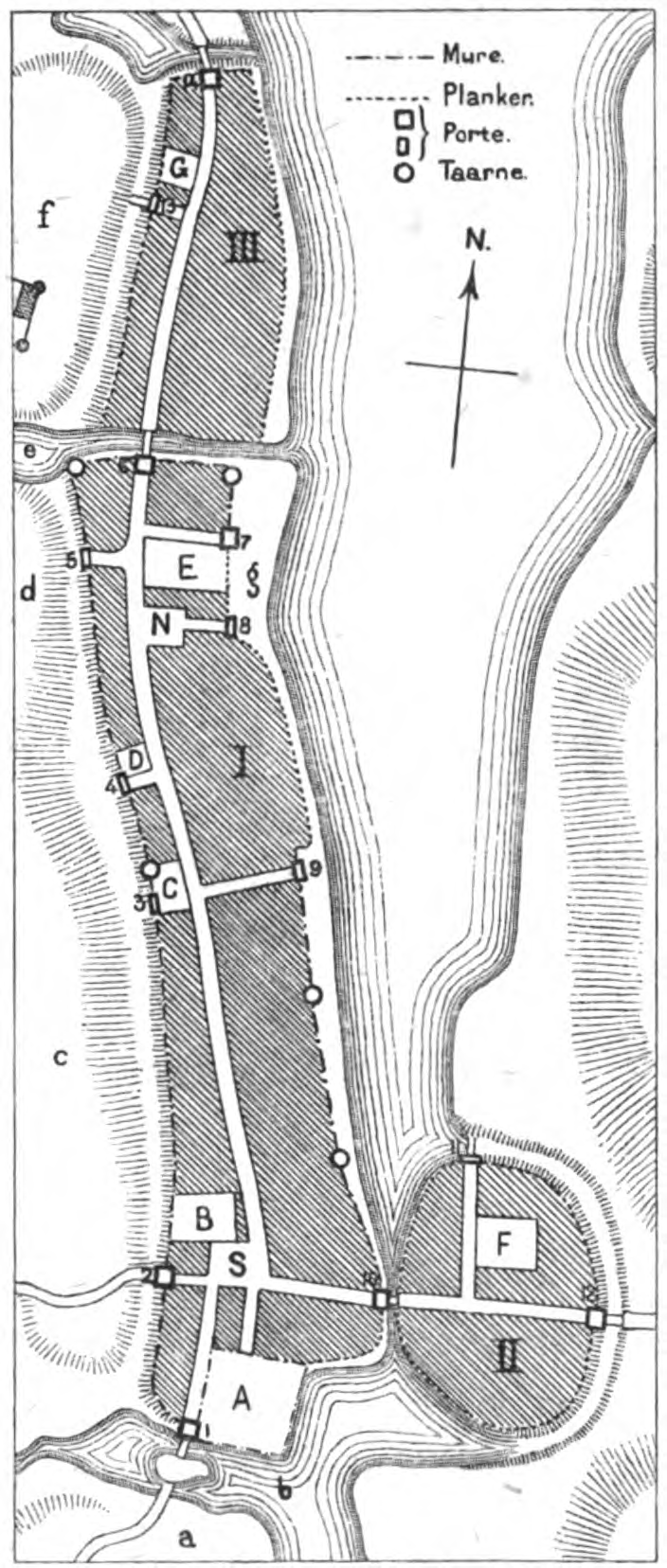 Flensborg bybefæstning: I=Den gamle by (Sct. Nikolaj og Sct. Mariæ/Vor Frue), II=Den østlige forstad (Sct. Hans), III=Den nordlige forstad (Sct. Gertrud/Ramsherred), S=Søndertorv, N=Nørretorv, A=Gråbrødrekloster, B=Nikolajkirke, C= Rådhus og Tingplads, D=Helligåndskloster, E=Mariekirke/Vor Frue Kirke, F=Johannes/Hans Kirke, G=Gjertrudskirke/Gertrudskirke, a=Munketoft, b=Mølledammen/Møllebækken/Flensåbredding, c og d=befæstet lejrplads på Friserbjerg og Helligåndsbjerg, e=Glimbæk/Nymølledam, f=Mariebjerg med Duborg/Flensborghus, g=Skibbro, 1=Rødeport, 2=Friserport, 3=Tingport, 4=Helligåndsport, 5=Kogangsport, 6=Nyport, 7=Kompagniport (Nørreskibbroport), 8=Skibbroport (Søndreskibbroport), 9=Slagterport/Knoglebrækkerport, 10=Mølleport/Angelboport, 11=Fiskerport, 12=Johannesport/Hansport/Angelboport, 13=Hulvejsport, 14=Nørreport